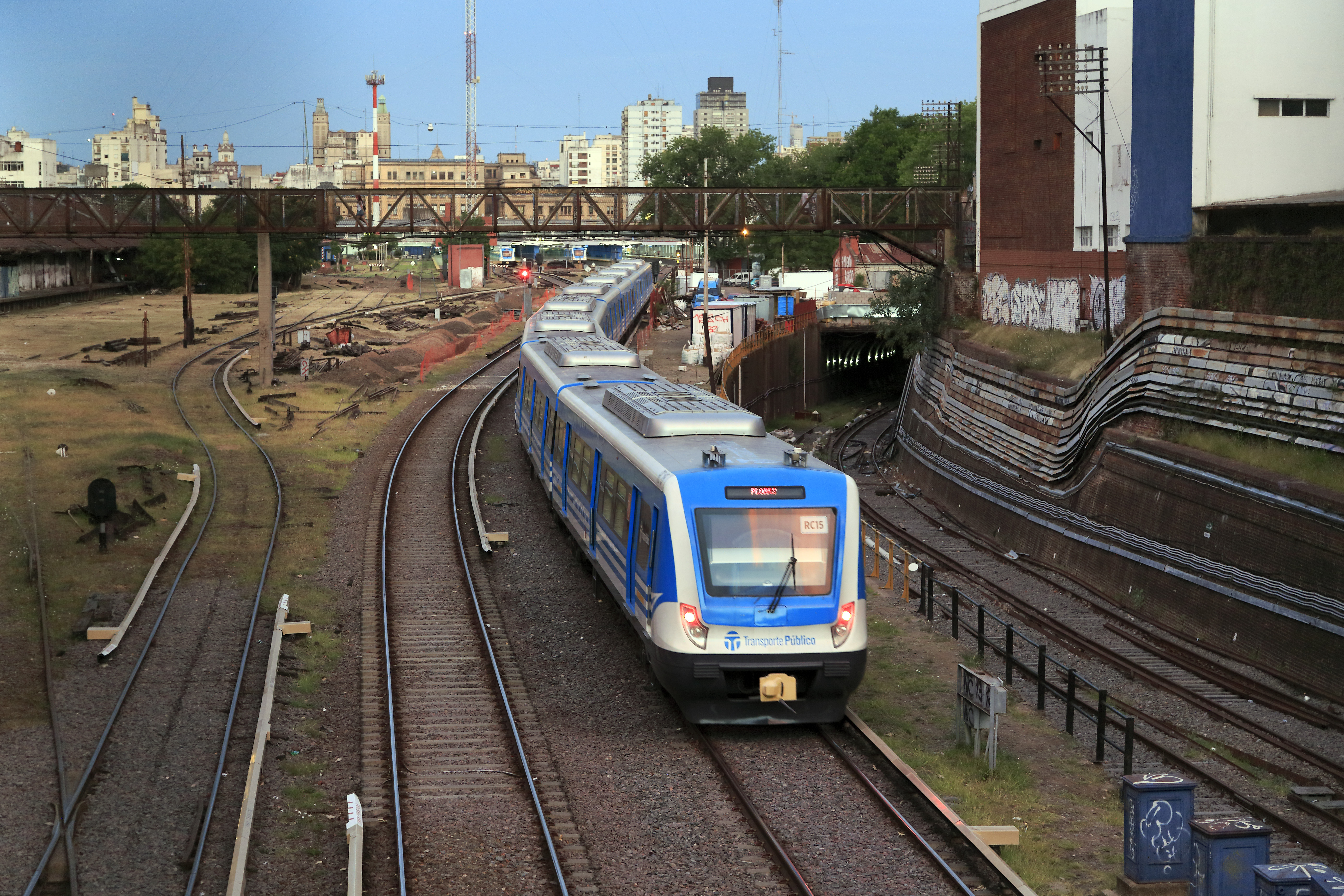 Das Befahren des rechten Gleises täuscht, der Zug verkehrte von Caballito über die rechte Strecke zum Bf Once de Septiembre. Die Zugzielanzeige ist bereits umgeschaltet, der Zug wird bis Flores zurückfahren. Ganz rechts liegt die Rampe zum Tunnelbahnhof Plaza Miserere, der einen direkten Übergang zu den Zügen der U-Bahn-Linie A bietet. Allerdings ist diese Strecke zum Aufnahmezeitpunkt schon länger außer Betrieb.